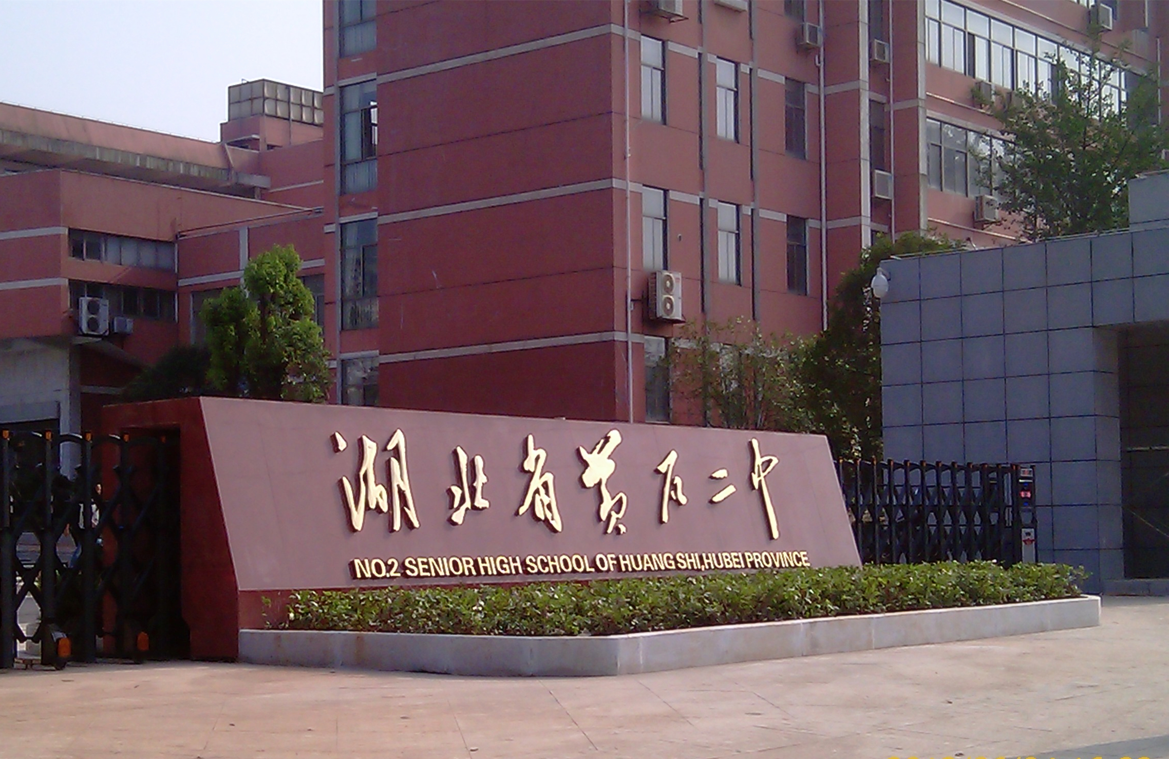 中文（中国大陆）: 此为湖北省黄石市第二中学校园正门。